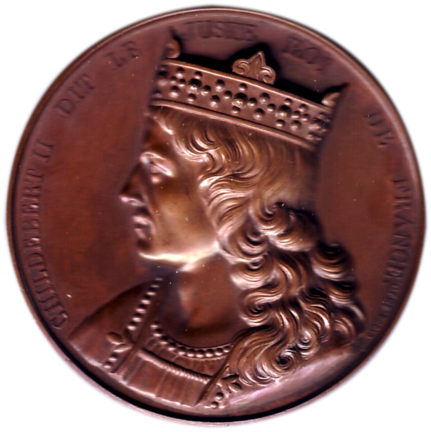 Childebert III, roi de Bourgogne et Neustrie et de Clotilde